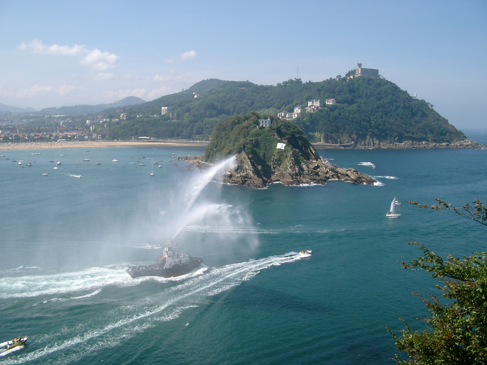 Estropadetan irabazle izandako omenez Itsasontzi bat ur zorrotak airera botaz, Donostia Nik neuk egina